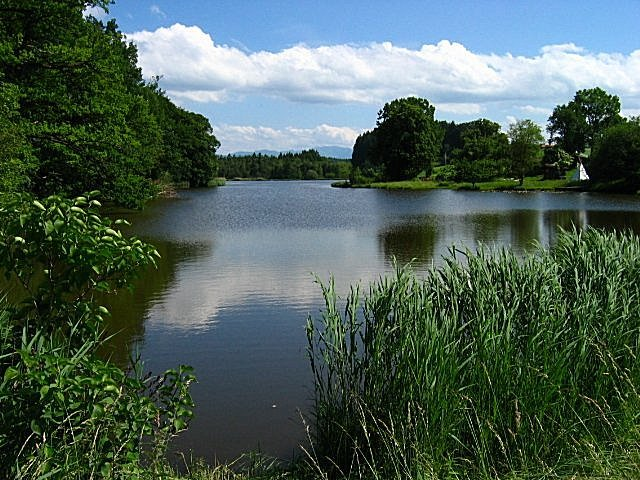 Sonderhamer Weiher am Oberlauf des Lüßbaches